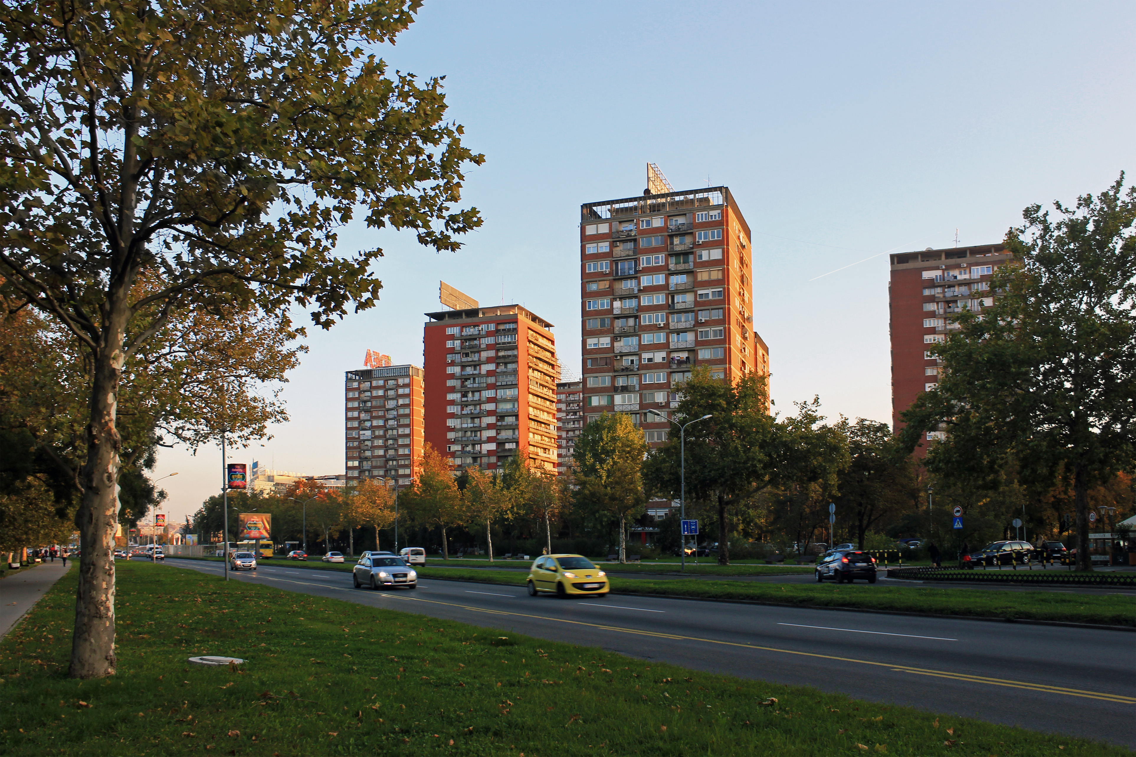 Белград. Бульвар Михаила Пупина